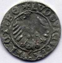 Półgrosz świdnicki. Rewers. autor: mzopw